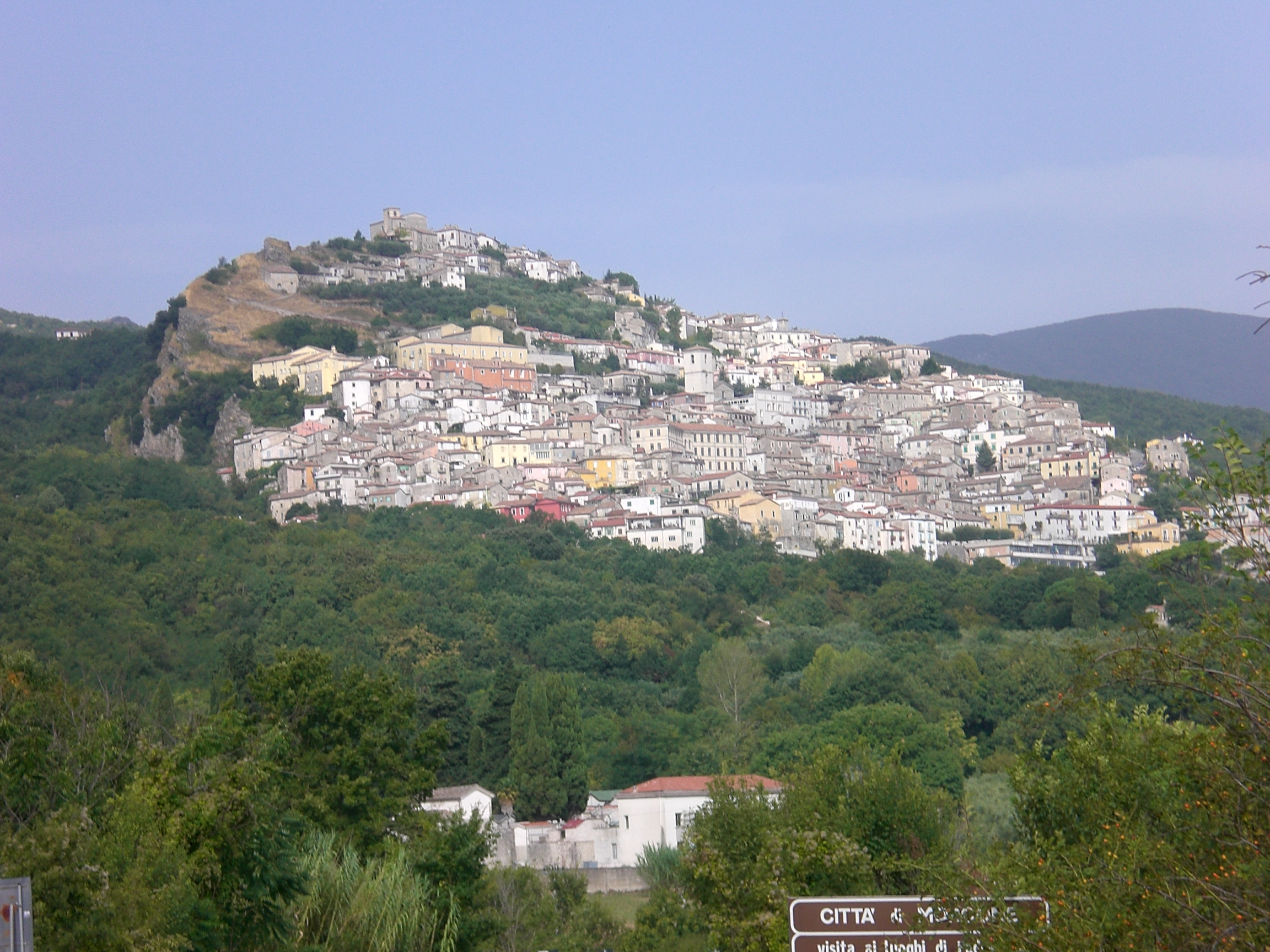 Panorama di Morcone, in provincia di Benevento